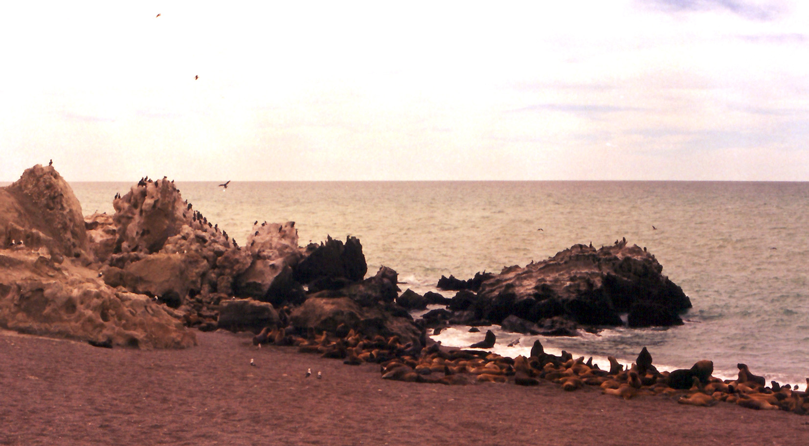 Loberia en El Duraznillo (Provincia de Santa Cruz) (foto tomada en enero de 2000)